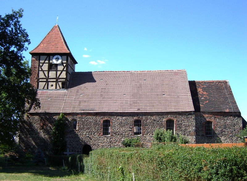 Dorfkirche von Rosian, Sachsen-Anhalt, Deutschland